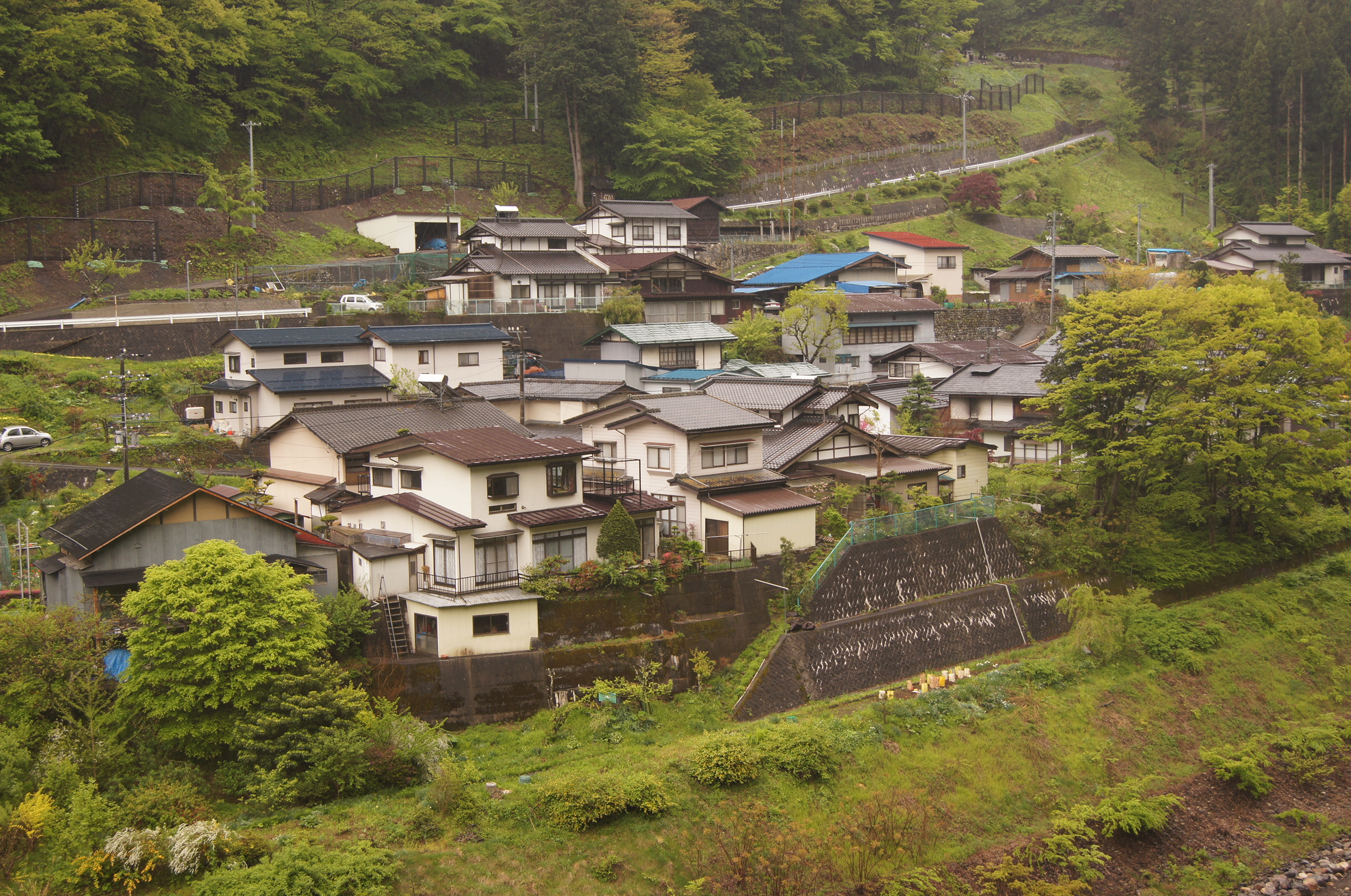 雑炊橋によって、島々宿・国道と結ばれる橋場集落